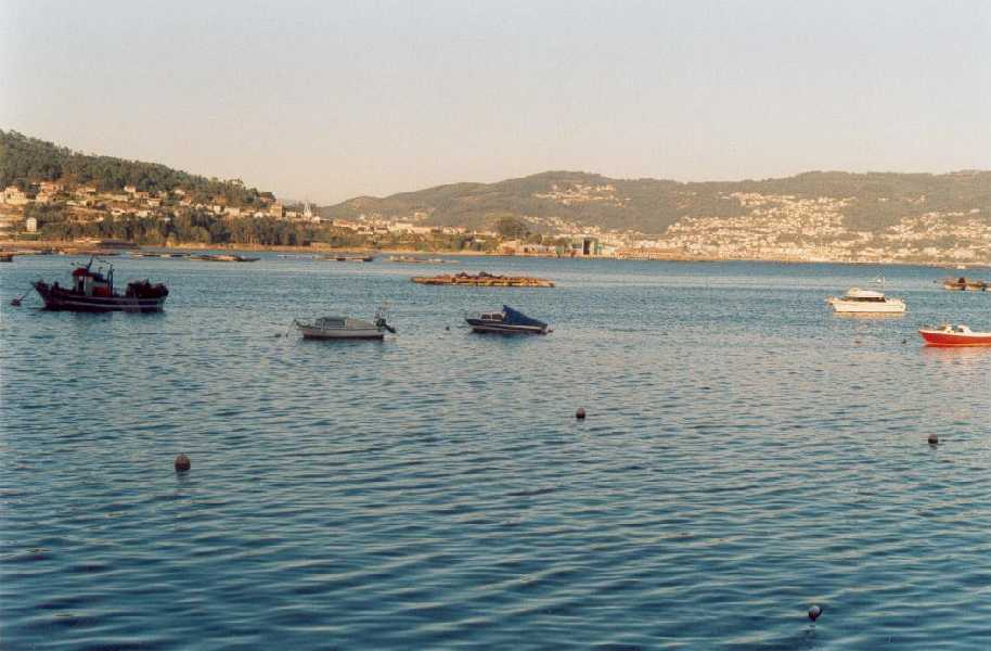 Vista de Moaña, Pontevedra, Galicia, España. Vista general del barrio de A Guia en la parroquia de Meira desde la ría de Vigo.Al fondo Chapela.